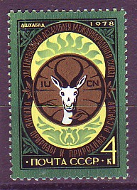 Марка СССР. 1978 г. Ашхабад. IUCN